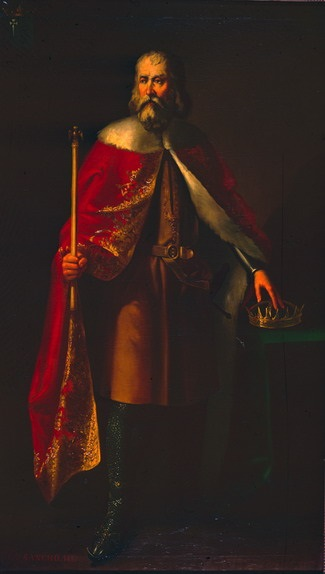 Retrato imaginario del rey Sancho Garcés III de Pamplona († 1035), que fue hijo del rey García Sánchez II de Pamplona y de la reina Jimena Fernández.